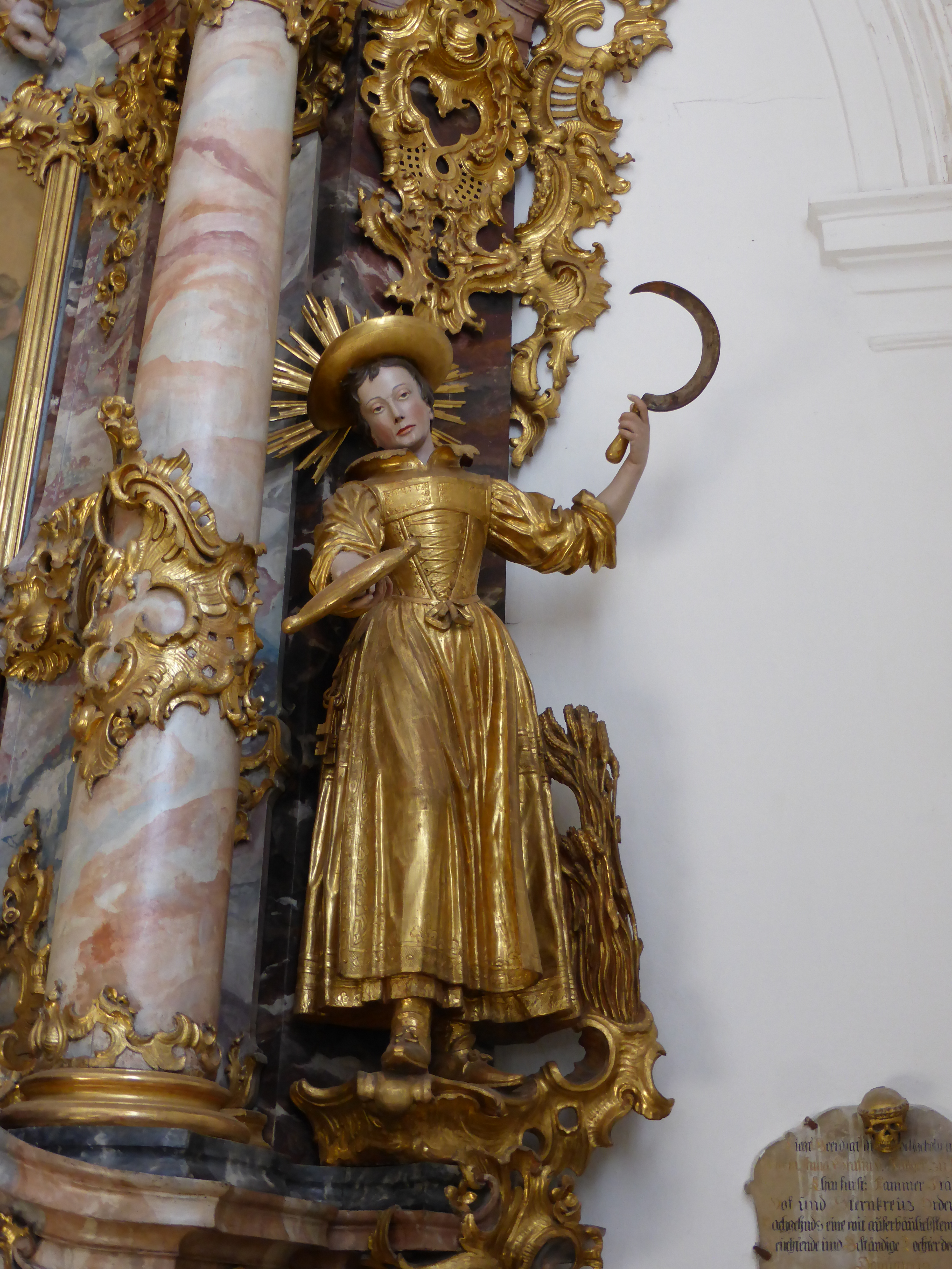 Hl. Notburger an einem Seitenaltar